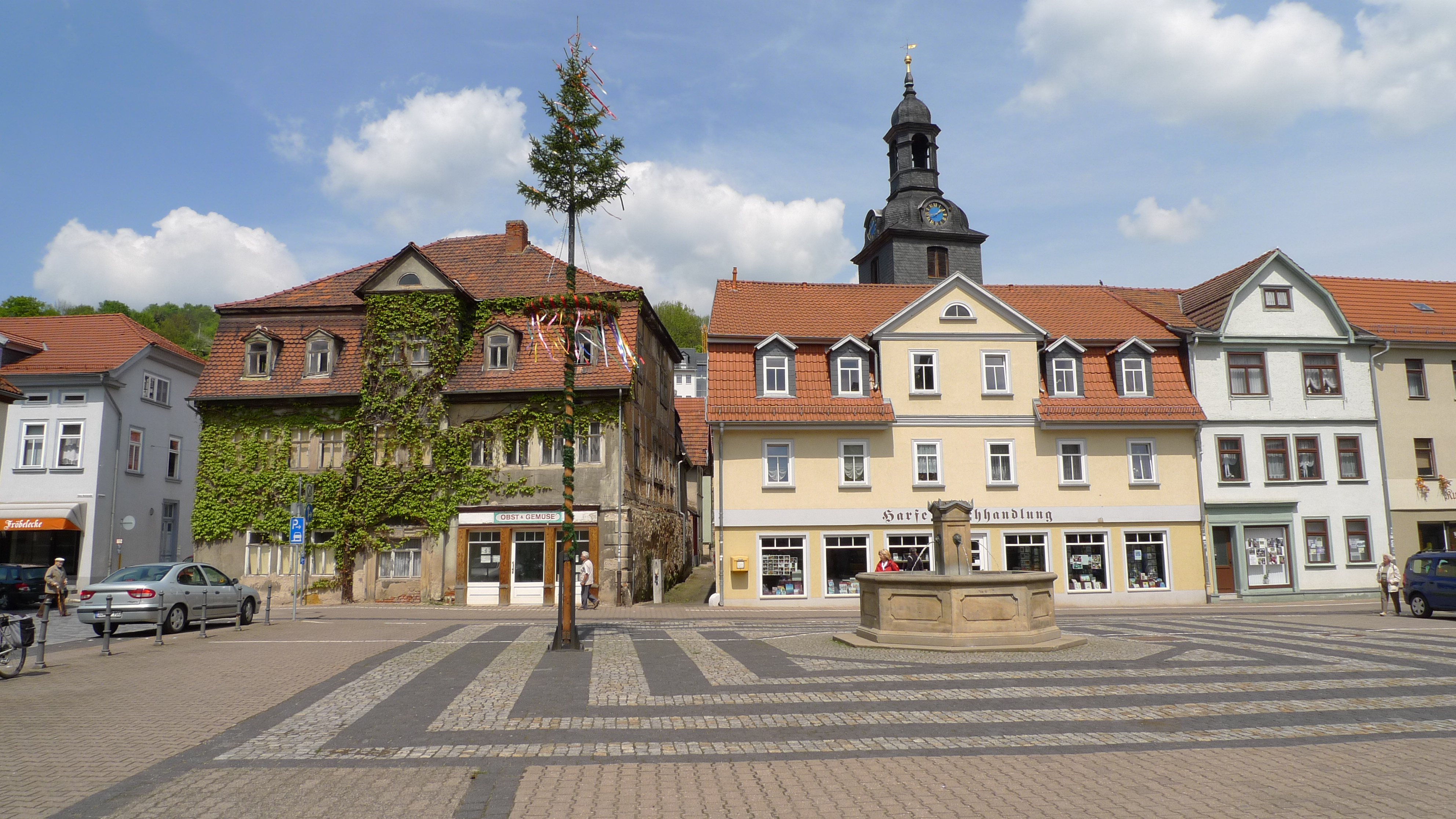 Der Marktplatz von Bad Blankenburg. Im Hintergrund die St. Nicolai Kirche